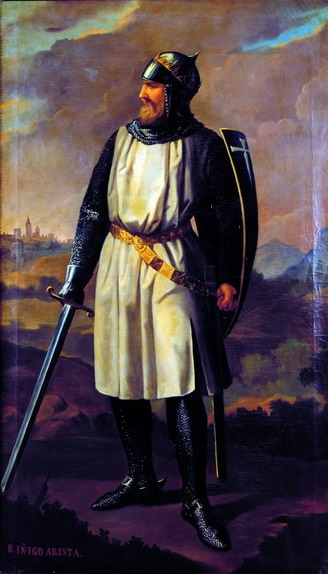 Retrato imaginario del rey Íñigo Arista de Pamplona († 851), que fue el primer rey de Pamplona y el fundador de la dinastía Íñiga.